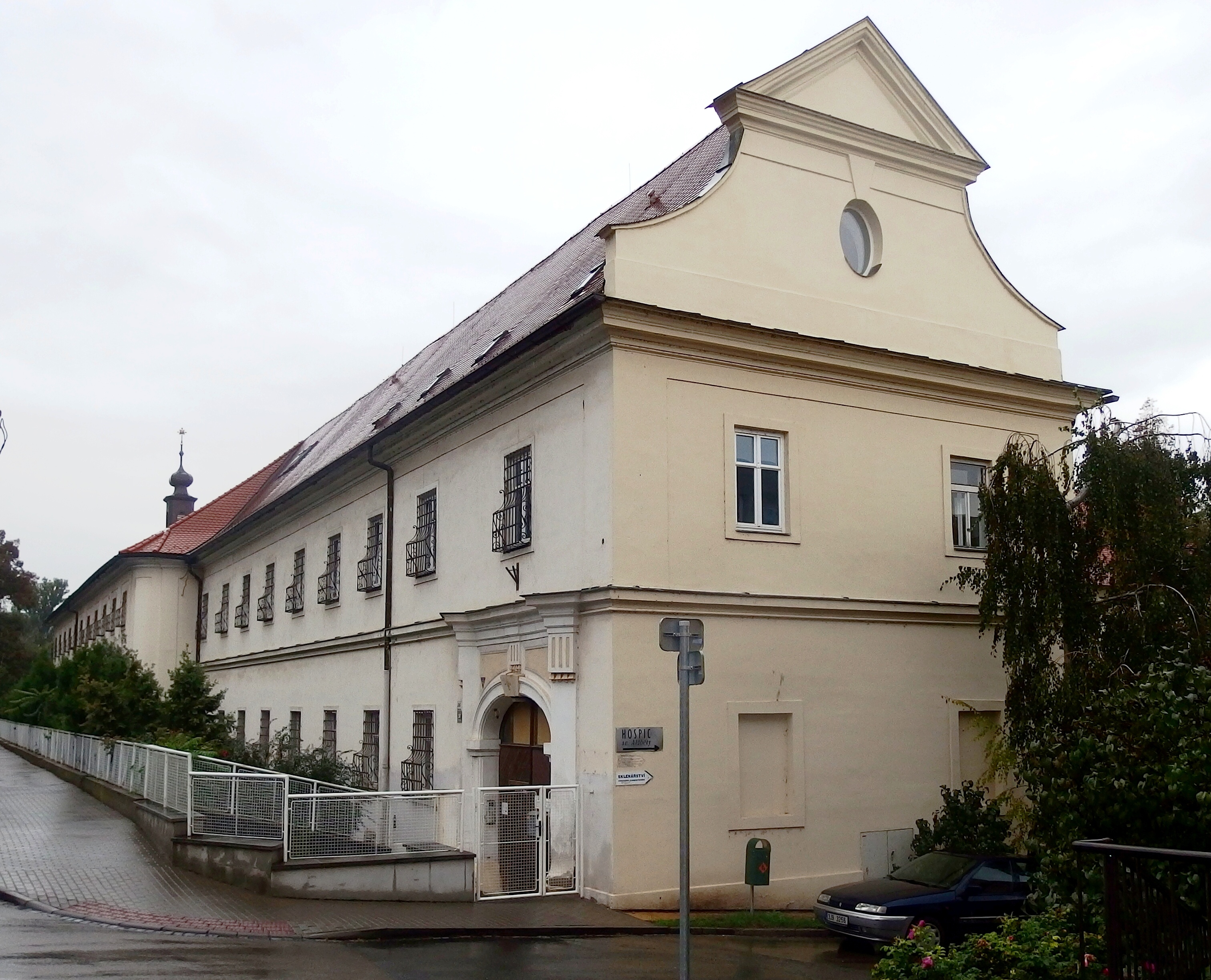 Klášter alžbětinek s kaplí, Kamenná 207/36, Štýřice.